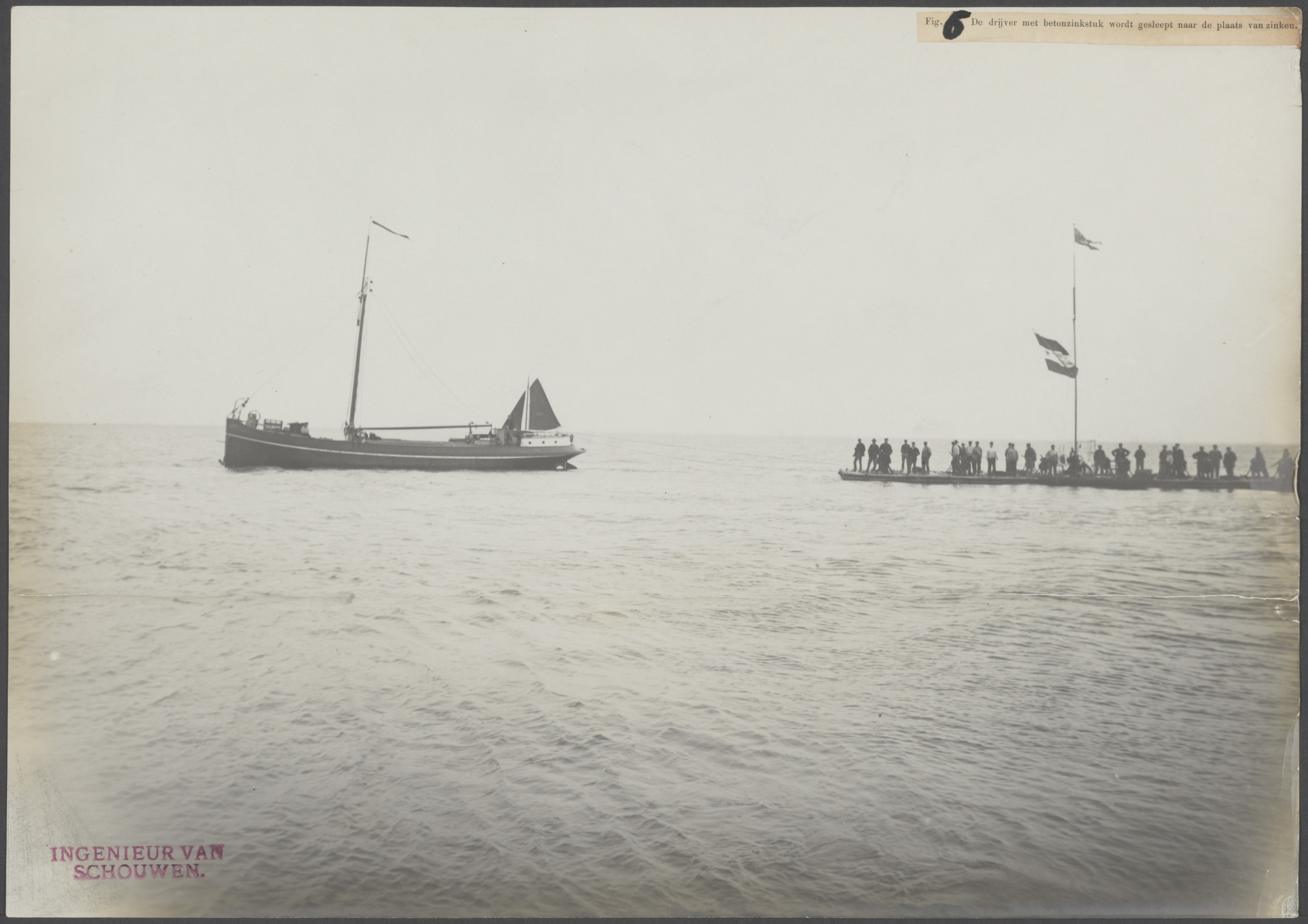 Collectie / archief : Fotocollectie Rijkswaterstaat : Metadata : Collectie / Archief : Fotocollectie Rijkswaterstaat Reportage / Serie : Zeeweringen van gewapend beton Beschrijving : De drijver met het betonzinkstuk wordt gesleept naar de plaats van afzinken Datum : 1905 Trefwoorden : betonzinkstukken, drijvers, waterbouw, zeeweringen, zinkstukken Fotograaf : [onbekend] Auteursrechthebbende : Public Domain logo Materiaalsoort : Foto (zwart/wit) Nummer archiefinventaris : bekijk toegang 2.24.11 Inventarisnummer : 3 Bestanddeelnummer : 26